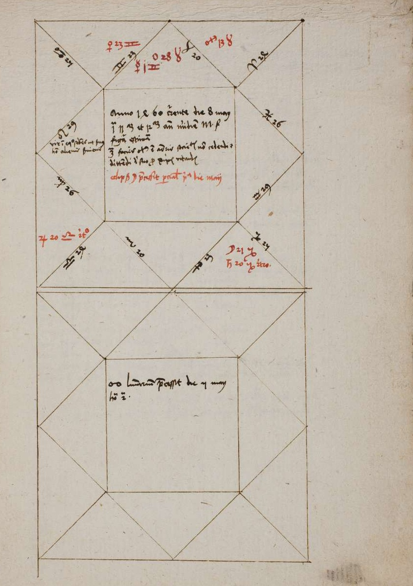 Horoskop, eigenhändig von Johannes Lichtenberger geschrieben